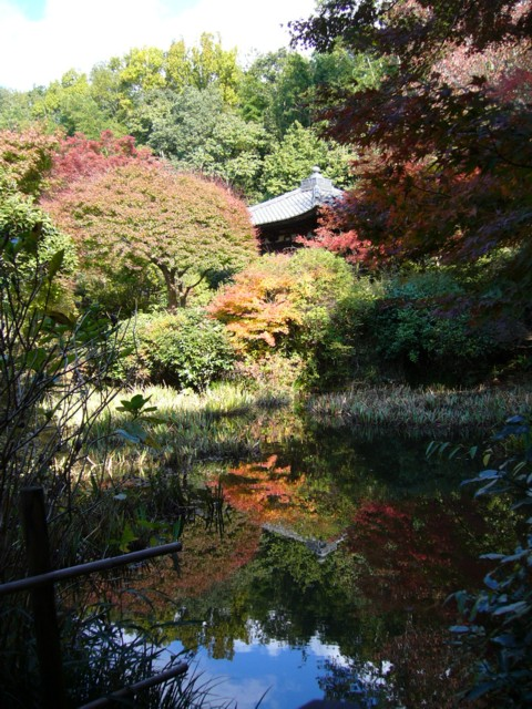 不退寺境内 染め初めの紅葉越しに多宝塔を望む 奈良市